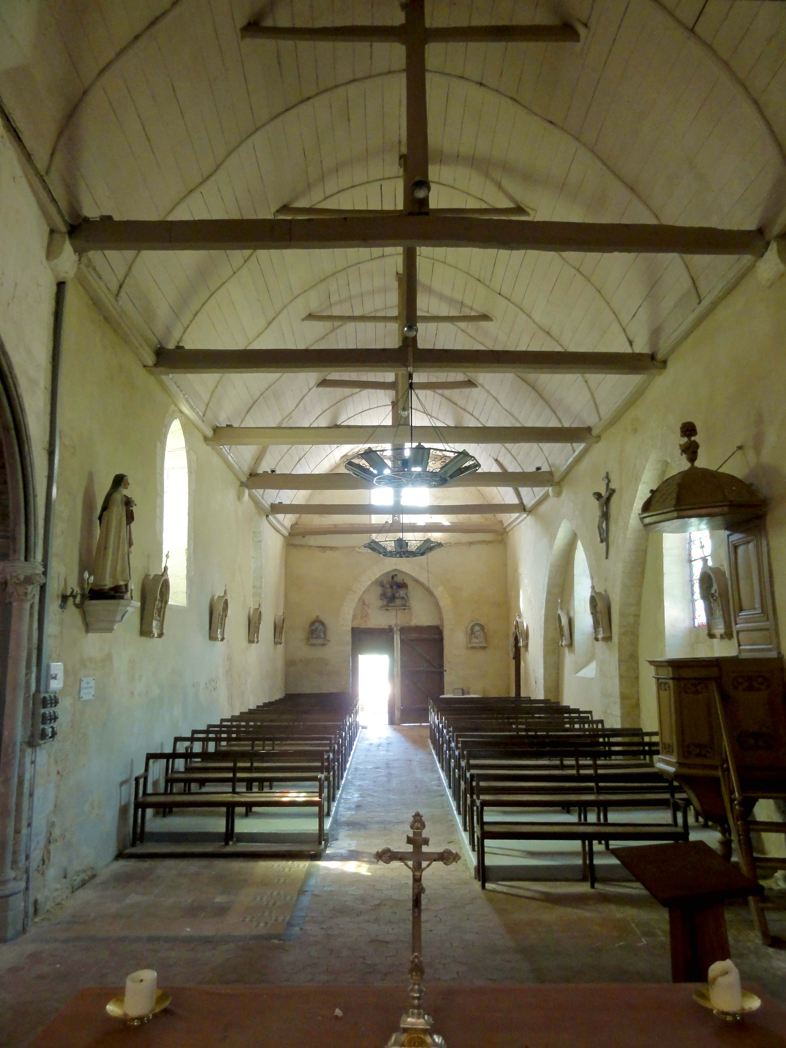 Intérieur de l'église (voir titre).